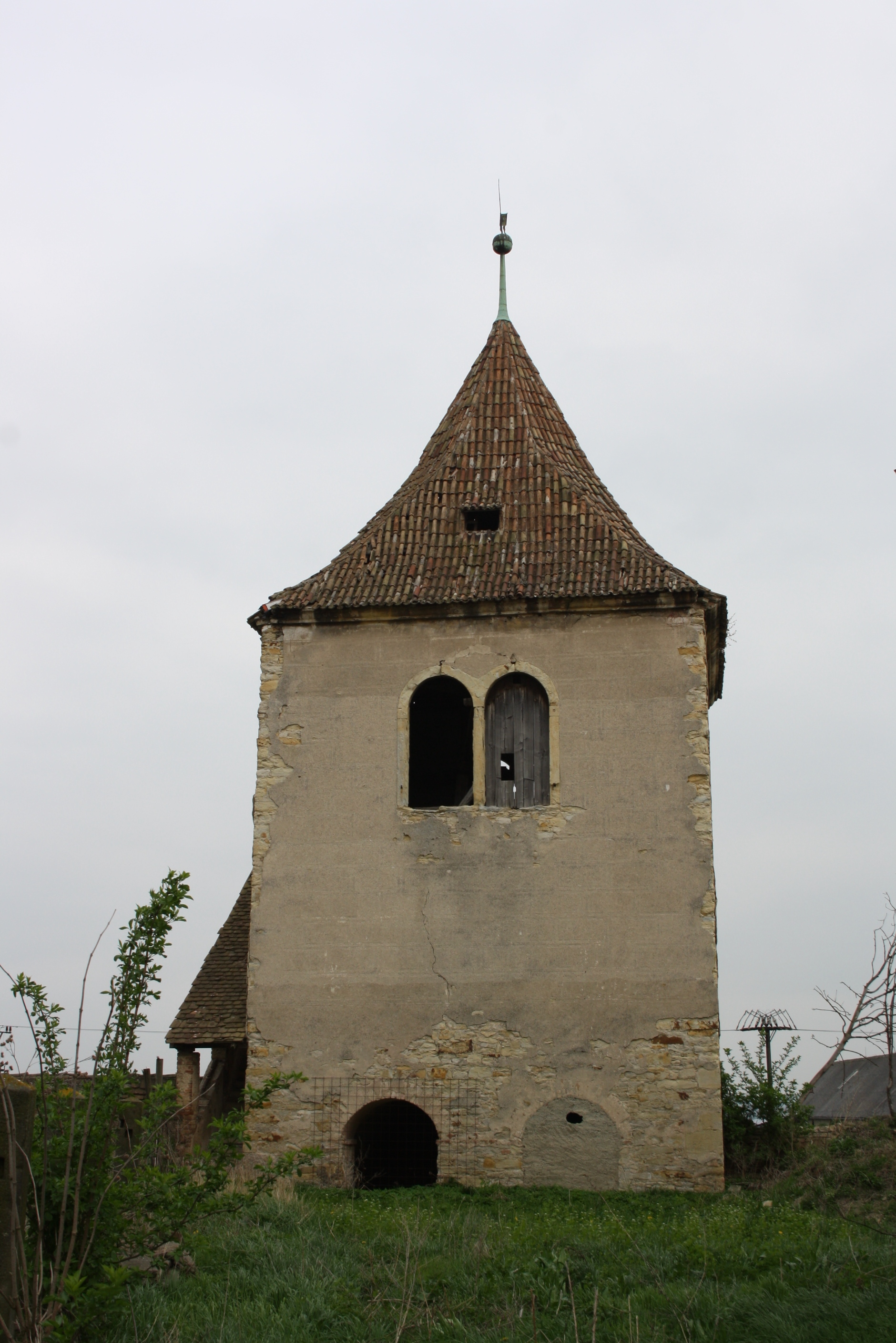 Zvonice u kostela Narození Panny Marie v Hrušovanech, části Polep.